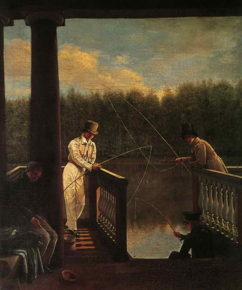 Картина "Молодые люди из беседки, стоящей у воды, ловят рыбу" из собрания Государственного исторического музея.